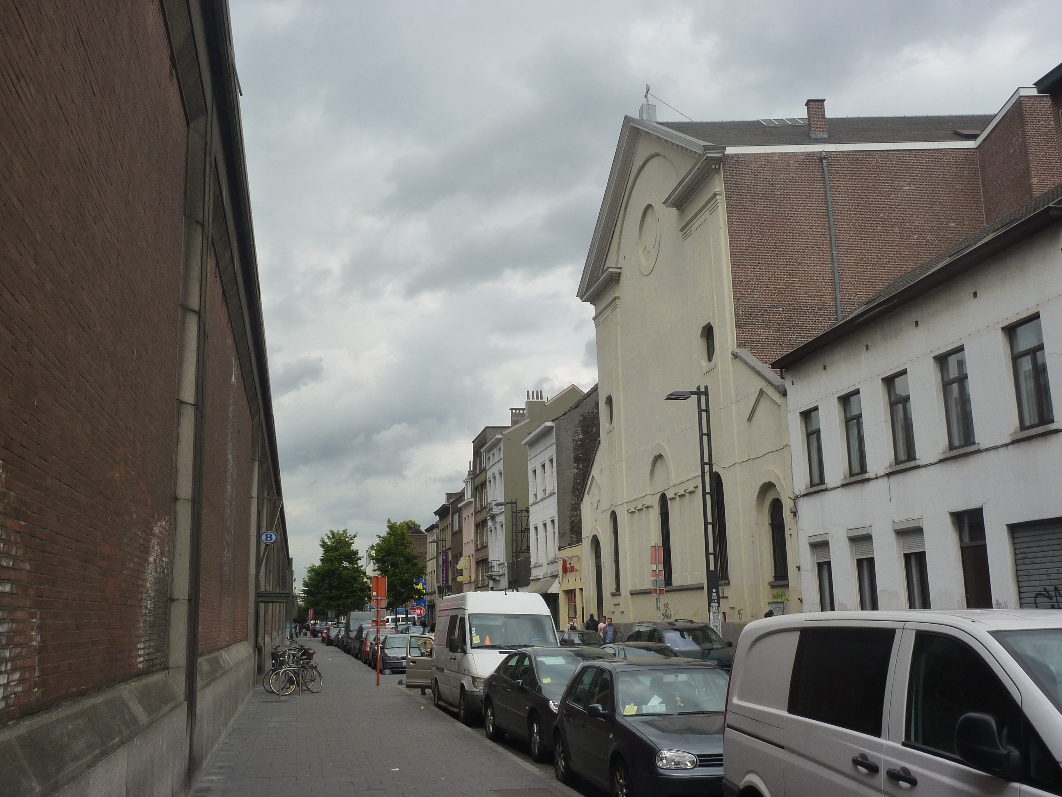 L'église Saints-Jean-et-Nicolas à Schaerbeek, Bruxelles, Belgique.